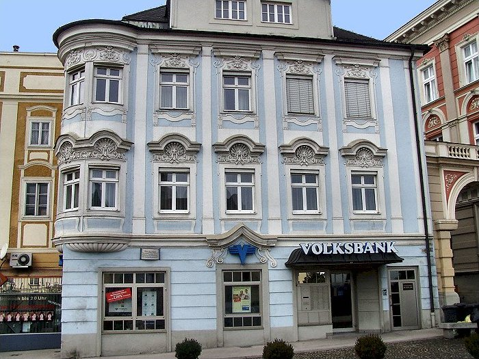 Hofrichterhaus